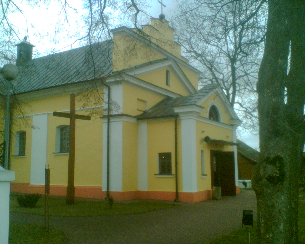 Kościół parafialny p.w. św. Jana Chrzciciela w Uhrusku (zabytek nr rejestr. A/93/670)